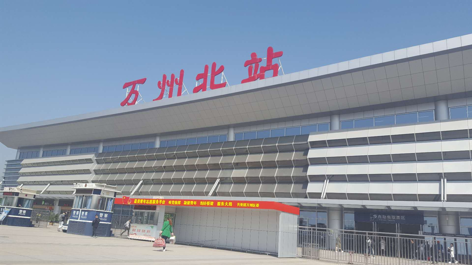 成局万州北站